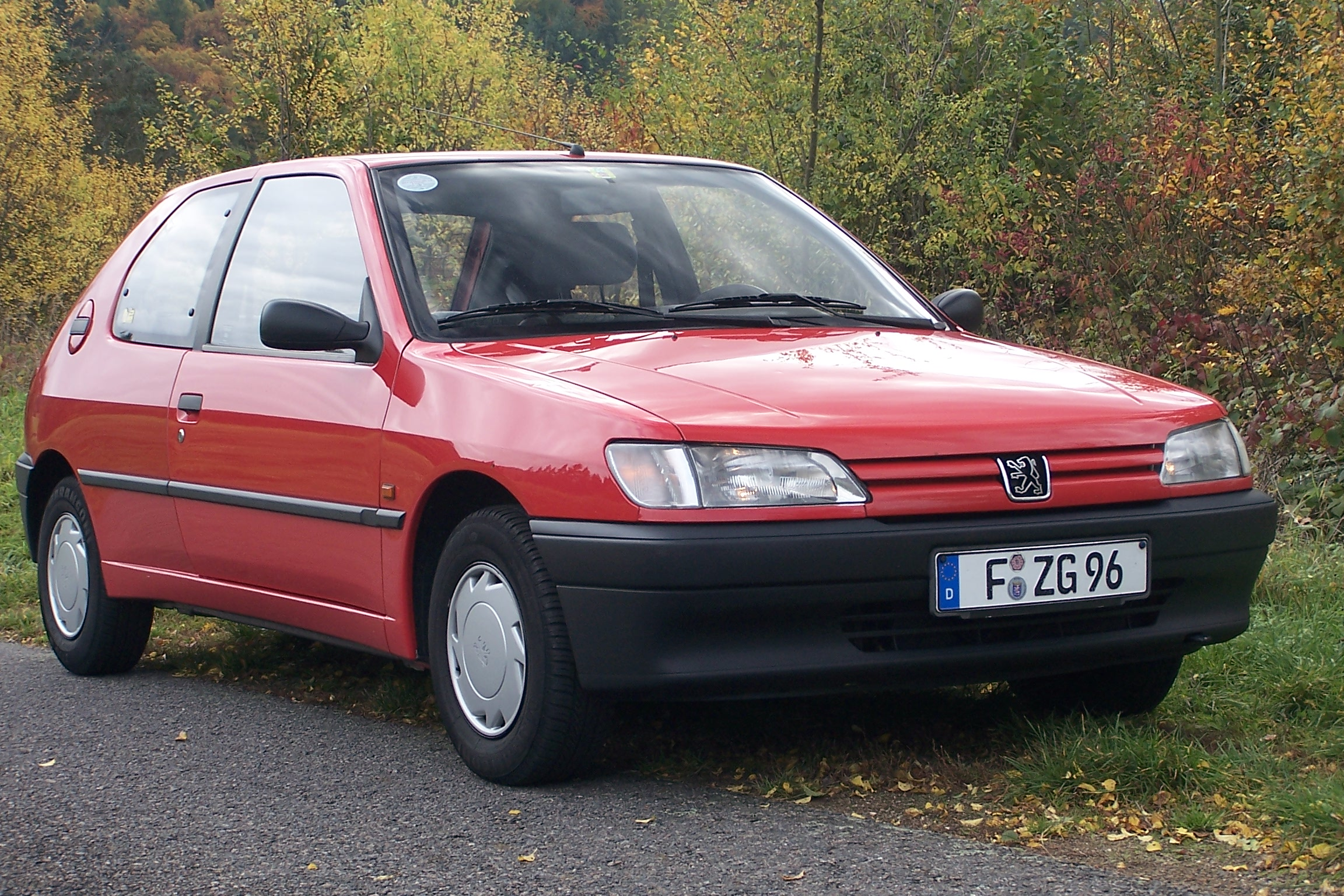 Bildbeschreibung: Peugeot 306 Atoll Fotograf/Zeichner: Maisflocke Datum: October 2005 andere Versionen: ...